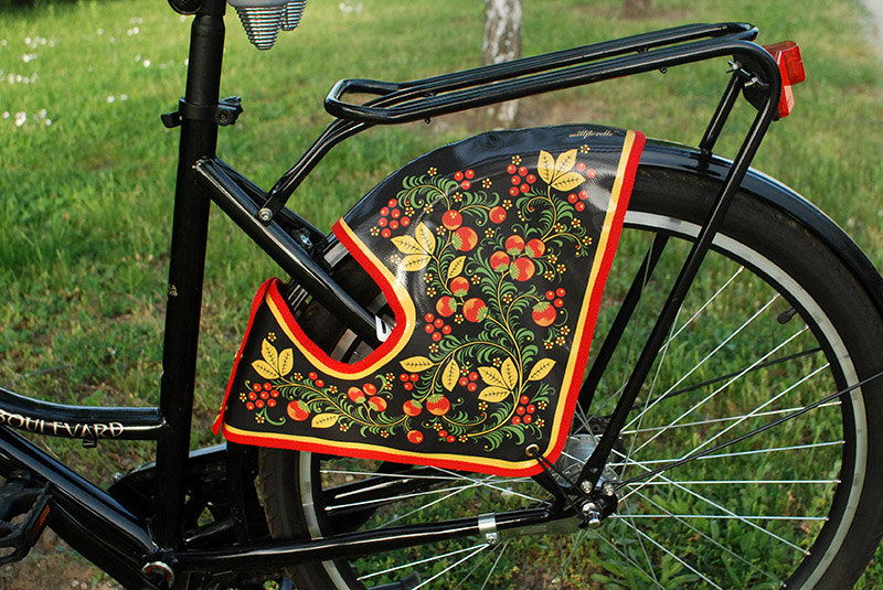 Хохлома